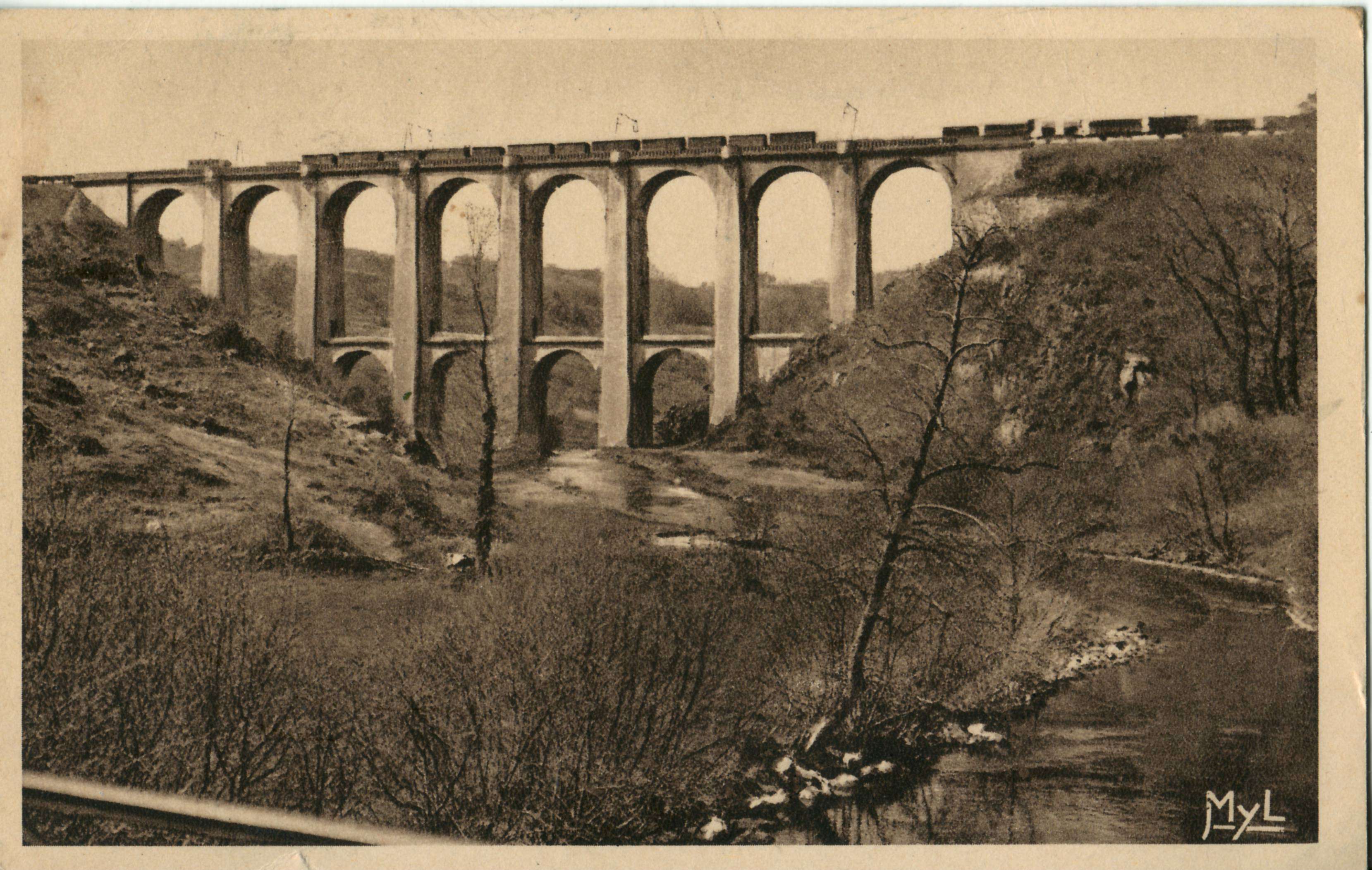 Carte postale ancienne éditée par MYL : BERSAC - Viaduc de Rocherolles